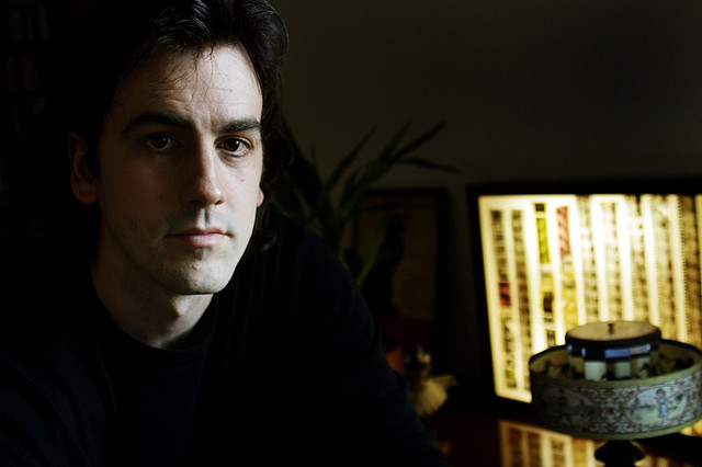 Isaki Lacuesta, director de cinema gironí